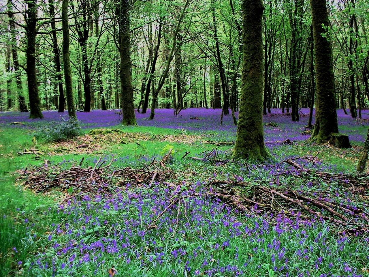 Paysage de la forêt des Andaines (Orne)